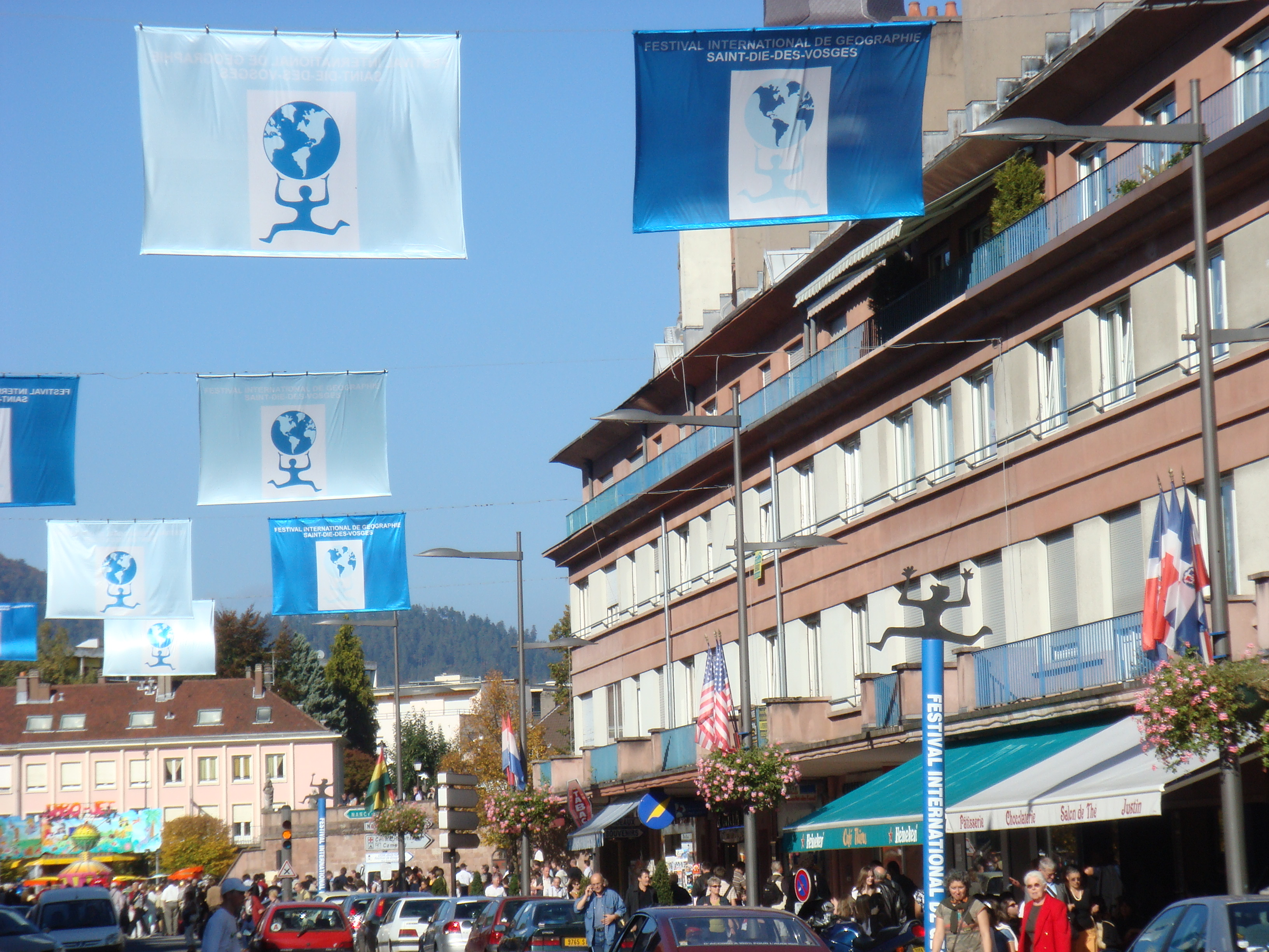 la rue Thiers de Saint-Dié des Vosges pavoisée aux couleurs du Festival International de Géographie